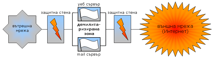 Firewall - Demilitarized zone (in Bulgarian).